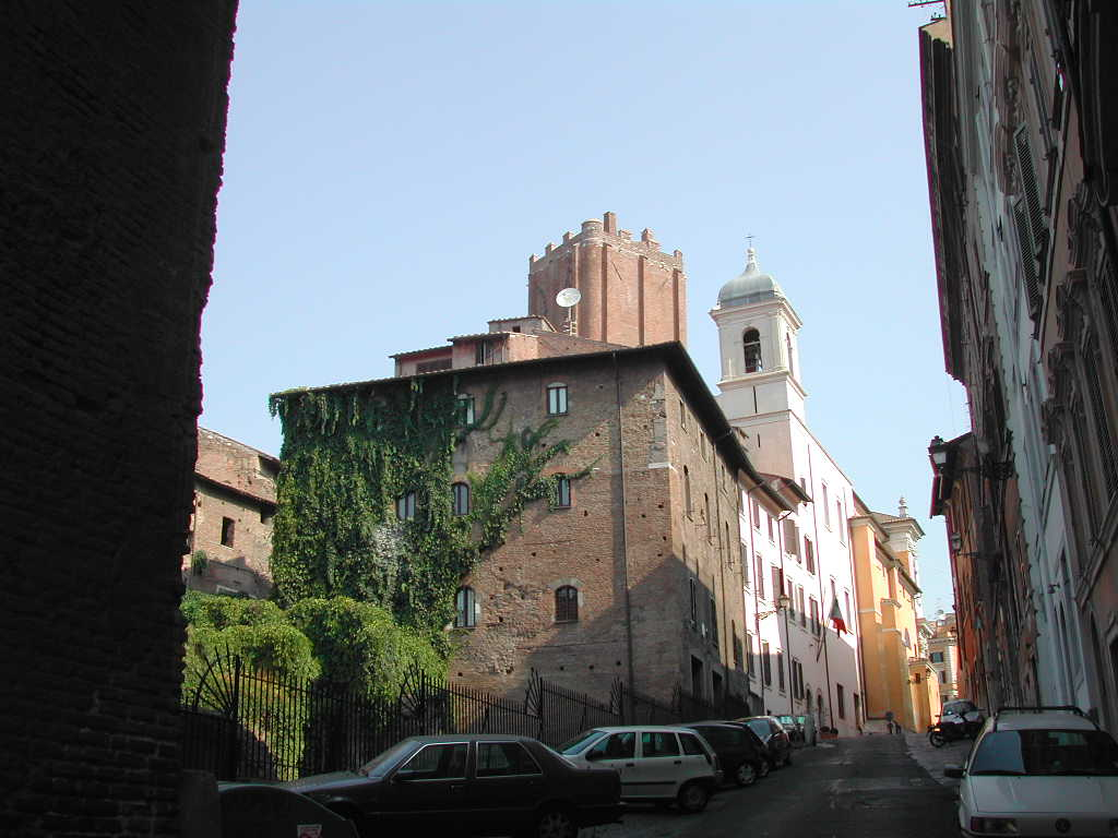 Roma, rione Monti: salita del Grillo: asinistra i Mercati di Traiano, sullo sfondo la Torre delle Milizie